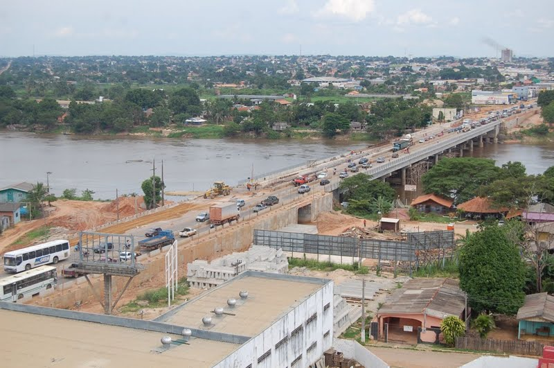 Obras de duplicação da ponte sobre o Rio Machado (ou Ji-Paraná) em Ji-Paraná - RO.